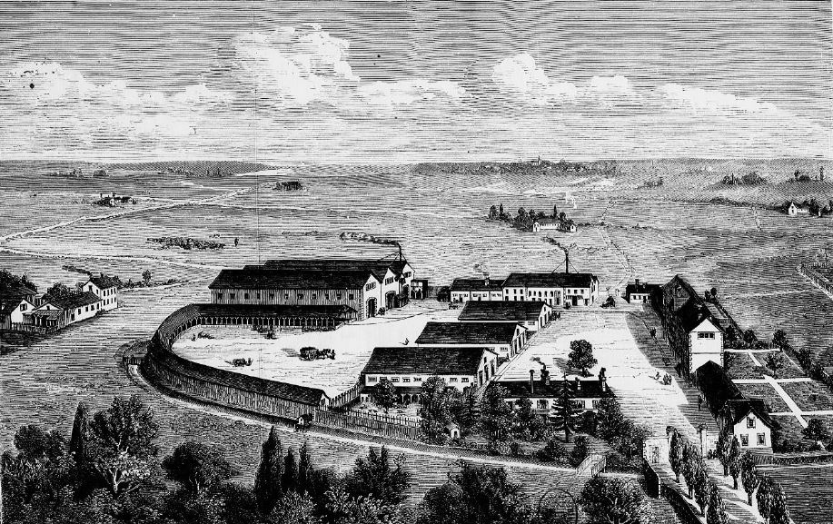 Plan général de la ferme de la Briche